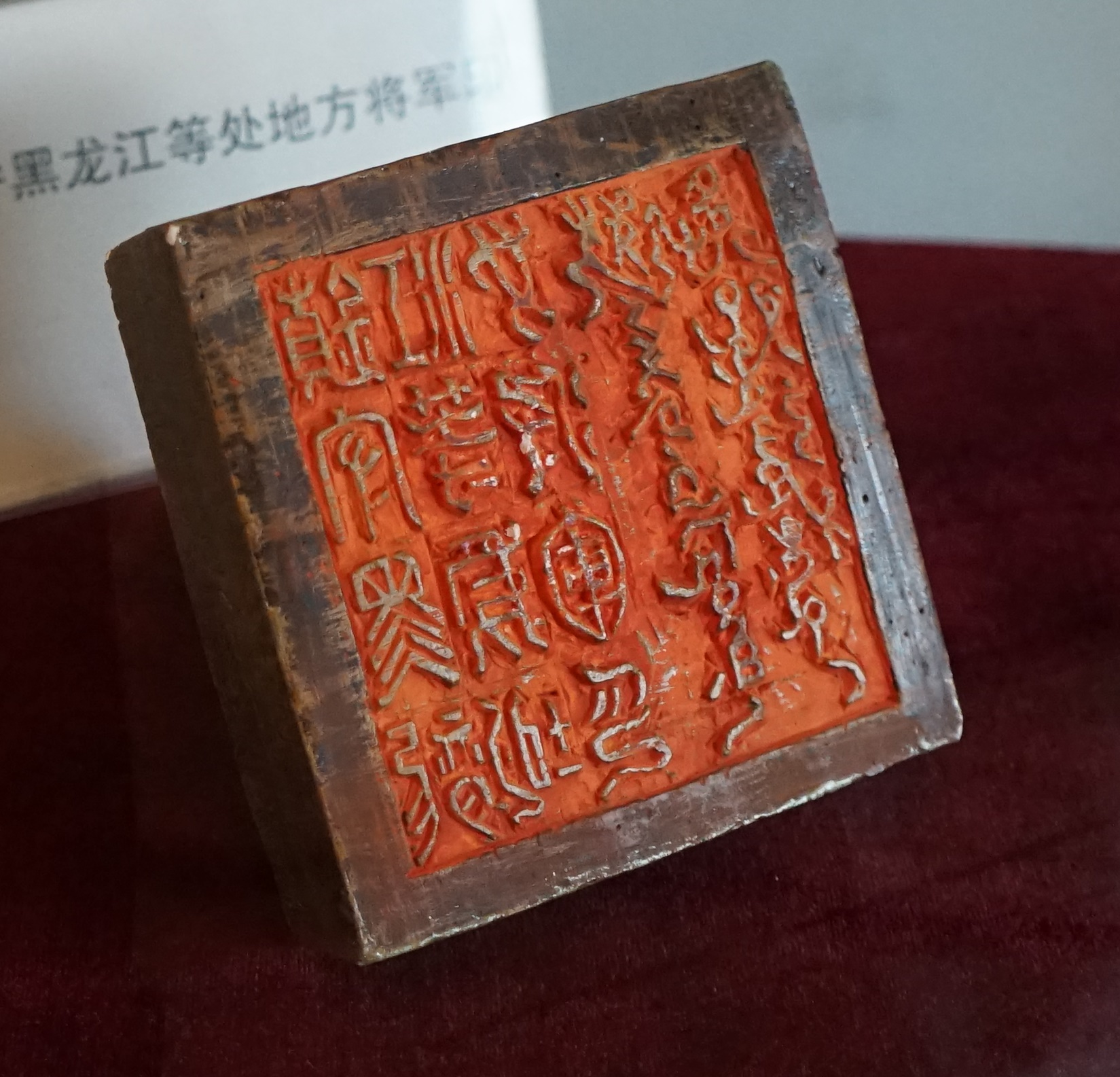 镇守黑龙江等处地方将军印，黑龙江将军府